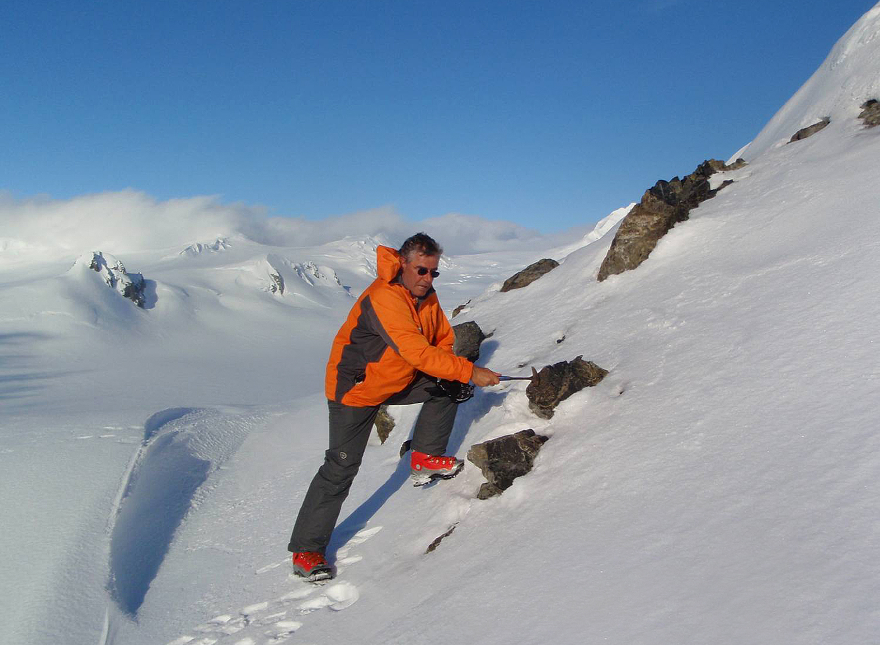 Проф. Христо Пимпирев по време на геоложко изследване на о.Ливингстън, Антарктика